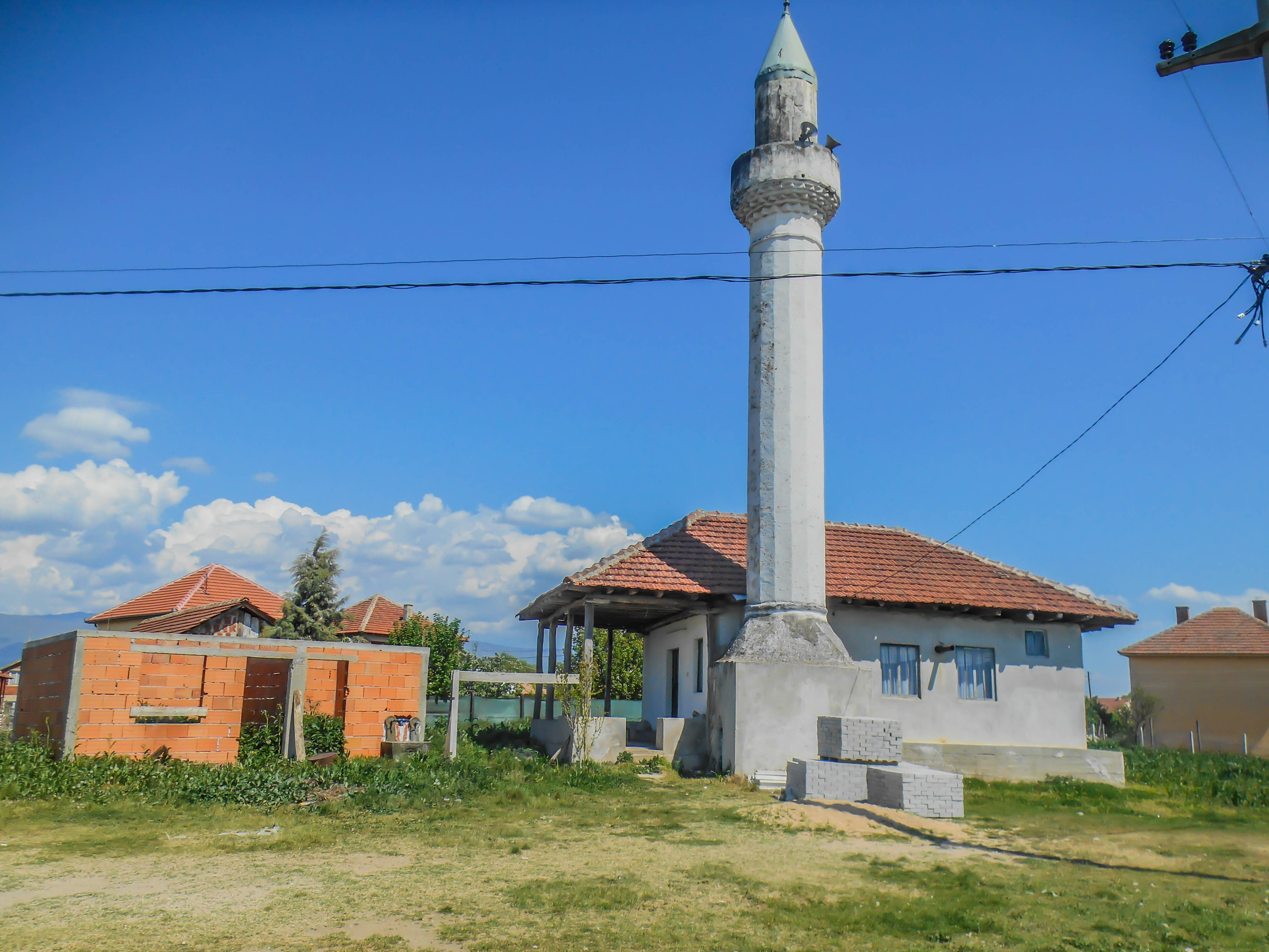 Џамија во Еднокуќево, Струмичко.